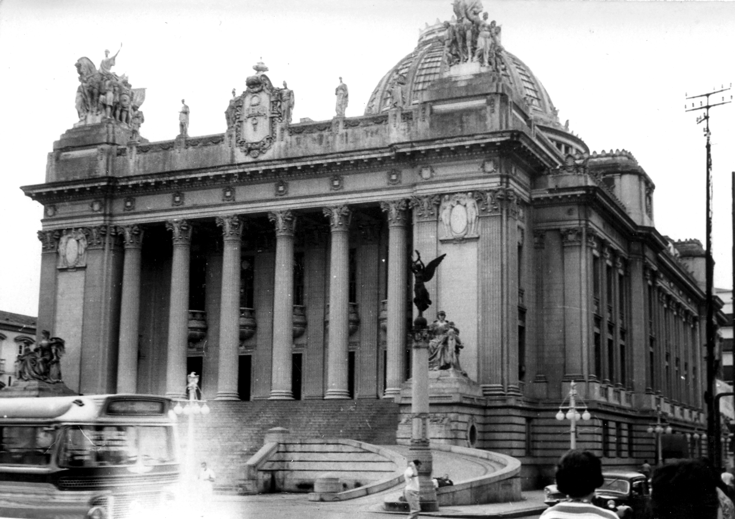 Palácio Tiradentes (28Mar1964) (Assembleia Legislativa) no Rio de Janeiro, Brasil